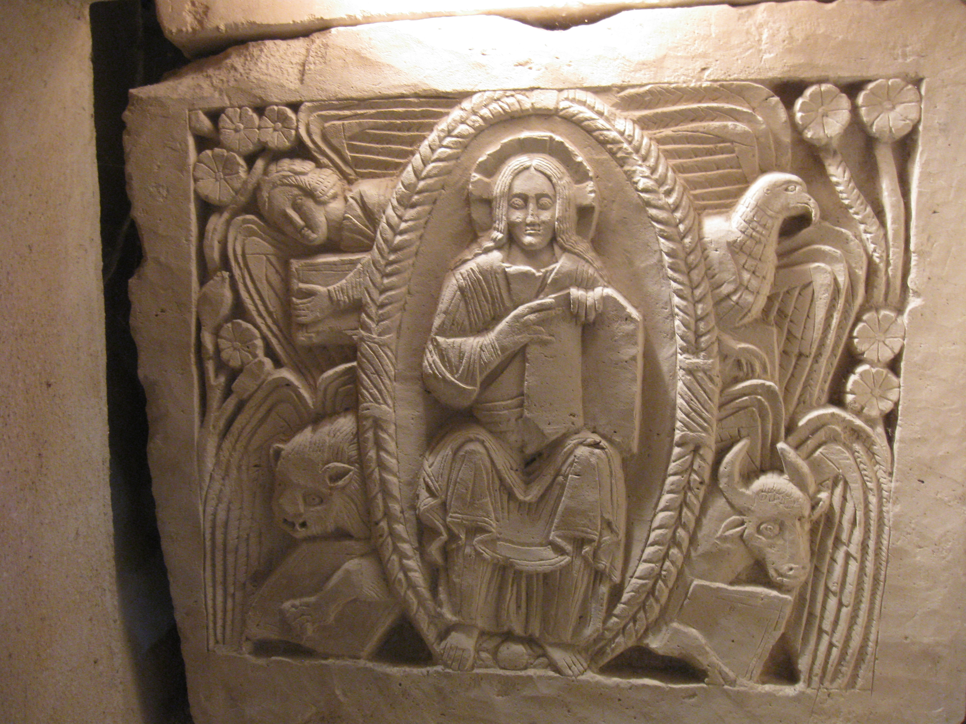 Une des faces du sarcophage de Saint-Agilbert. Il représente le Christ entouré des quatre évangélistes représentés par leurs attributs : Jean (l'aigle), Luc (le taureau), Matthieu (l'homme) et Marc (le lion). Crypte Saint-Paul de Jouarre, (Seine-et-Marne, région Île-de-France).